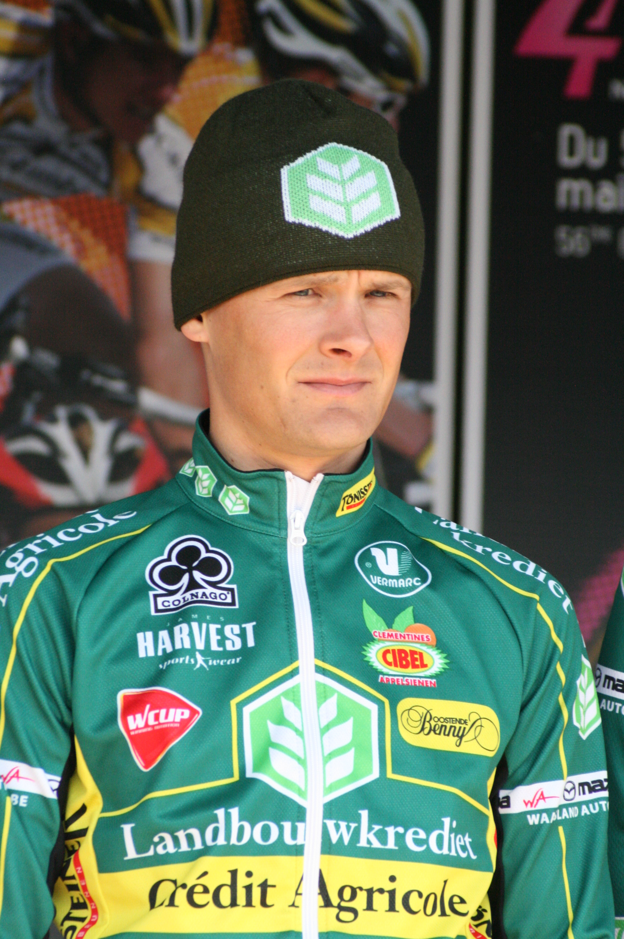 Steven Caethoven lors de la présentation des équipes des 4 jours de Dunkerque 2010